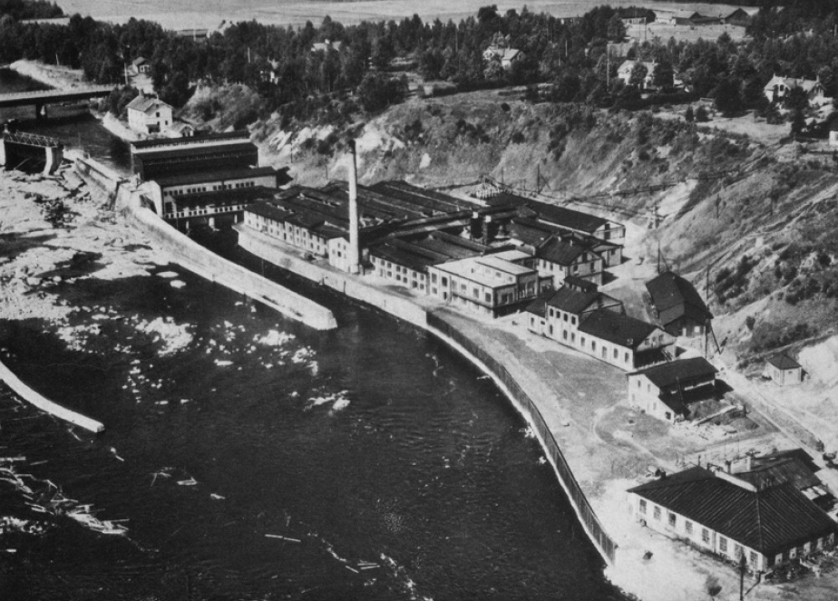 Flygfoto över Månsbo kloratfabrik